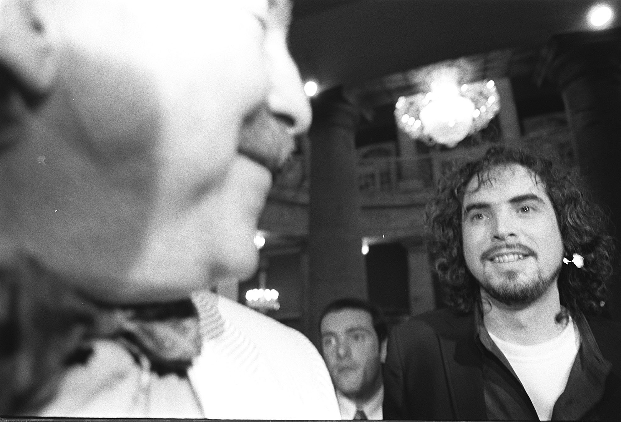 98 03 06 arte y gente cine pedro armendariz a la izquierda y a la derecha alfonso cuaron director de cine en la inauguracion de la xiii muestra de cine mexicano llegando al teatro degollado foto de angelica jurado